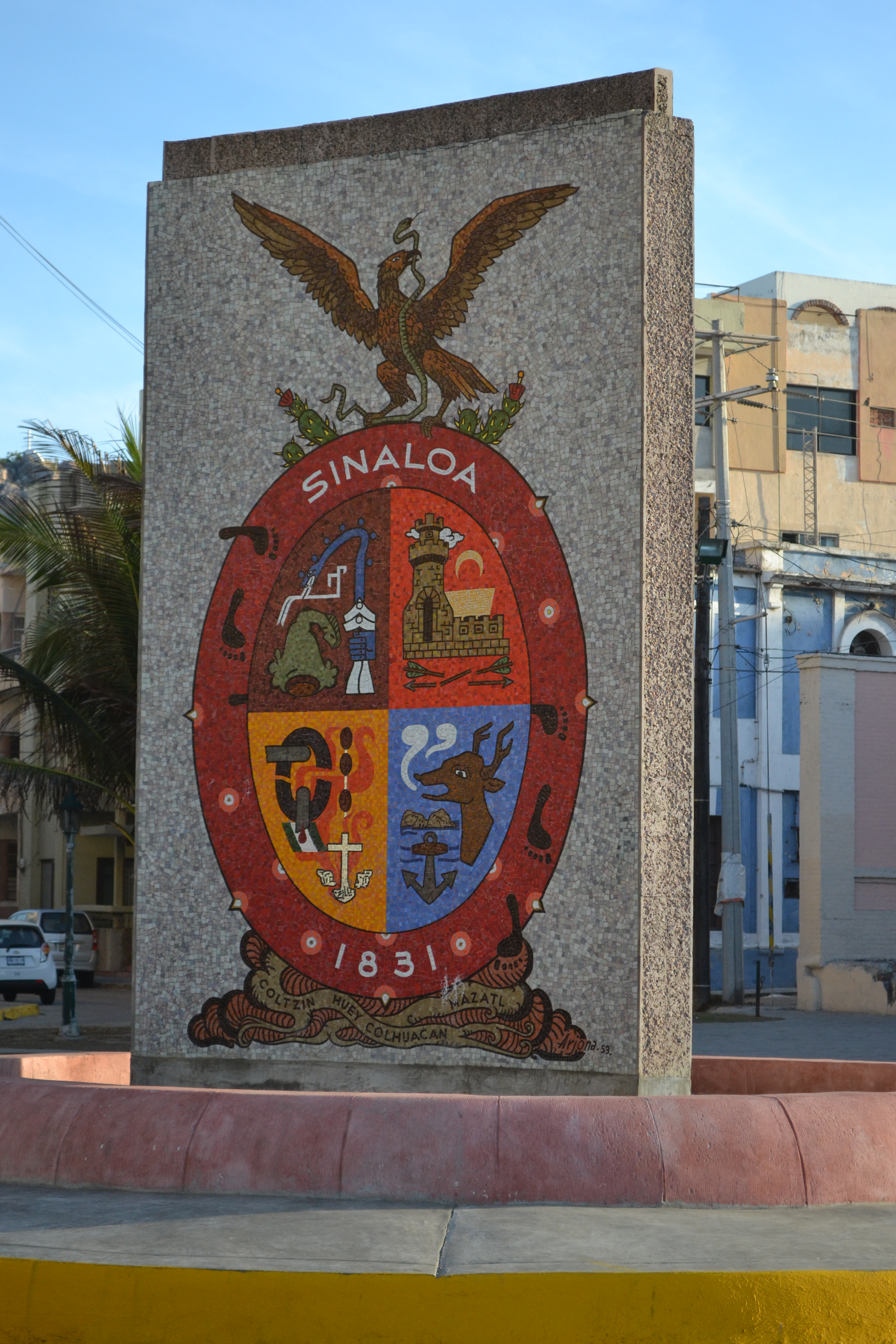 Escudo de Sinaloa en playa Olas Altas, Mazatlán, Sinaloa.